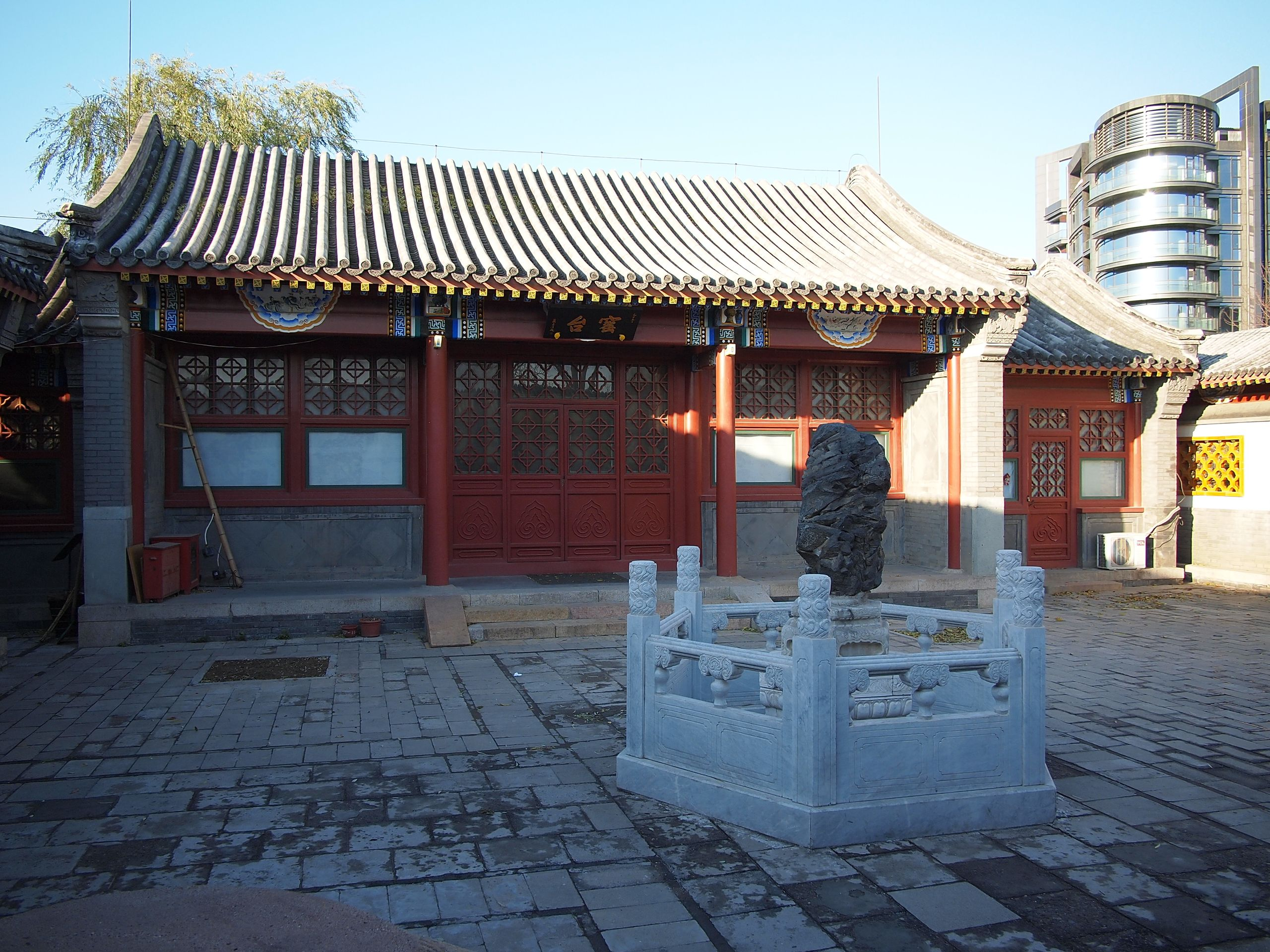 窑台 - Kiln Site - 2011.11